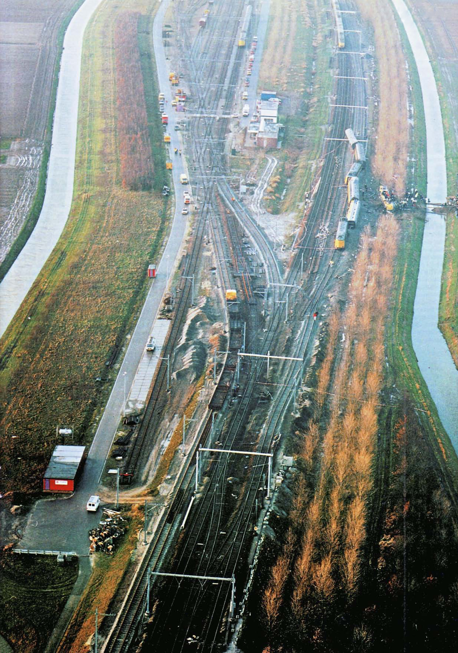 Luchtfoto van de situatie na het ongeval met een Intercity te Hoofddorp.